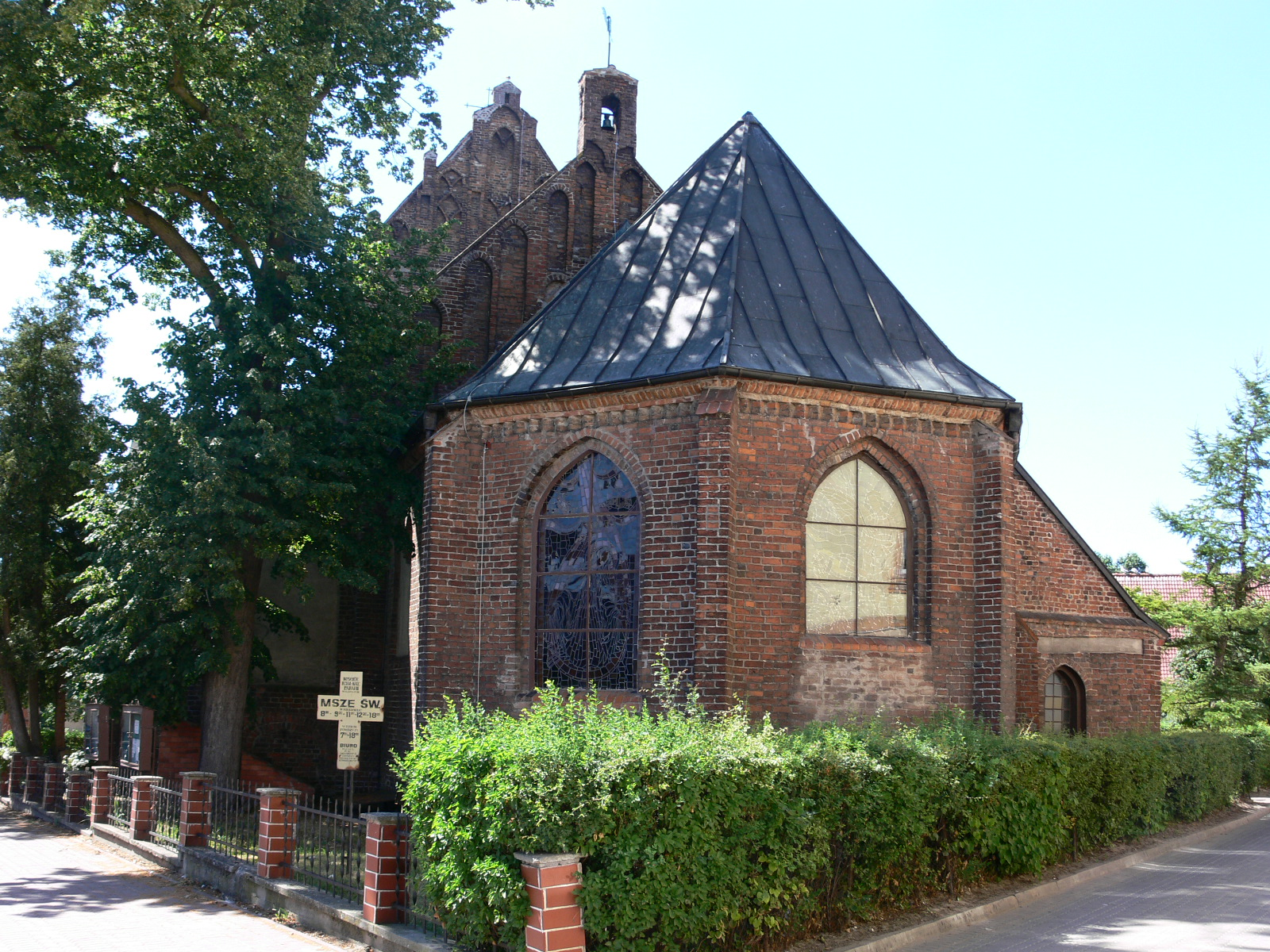 Karlino - kościół pw. św.Michała Archanioła